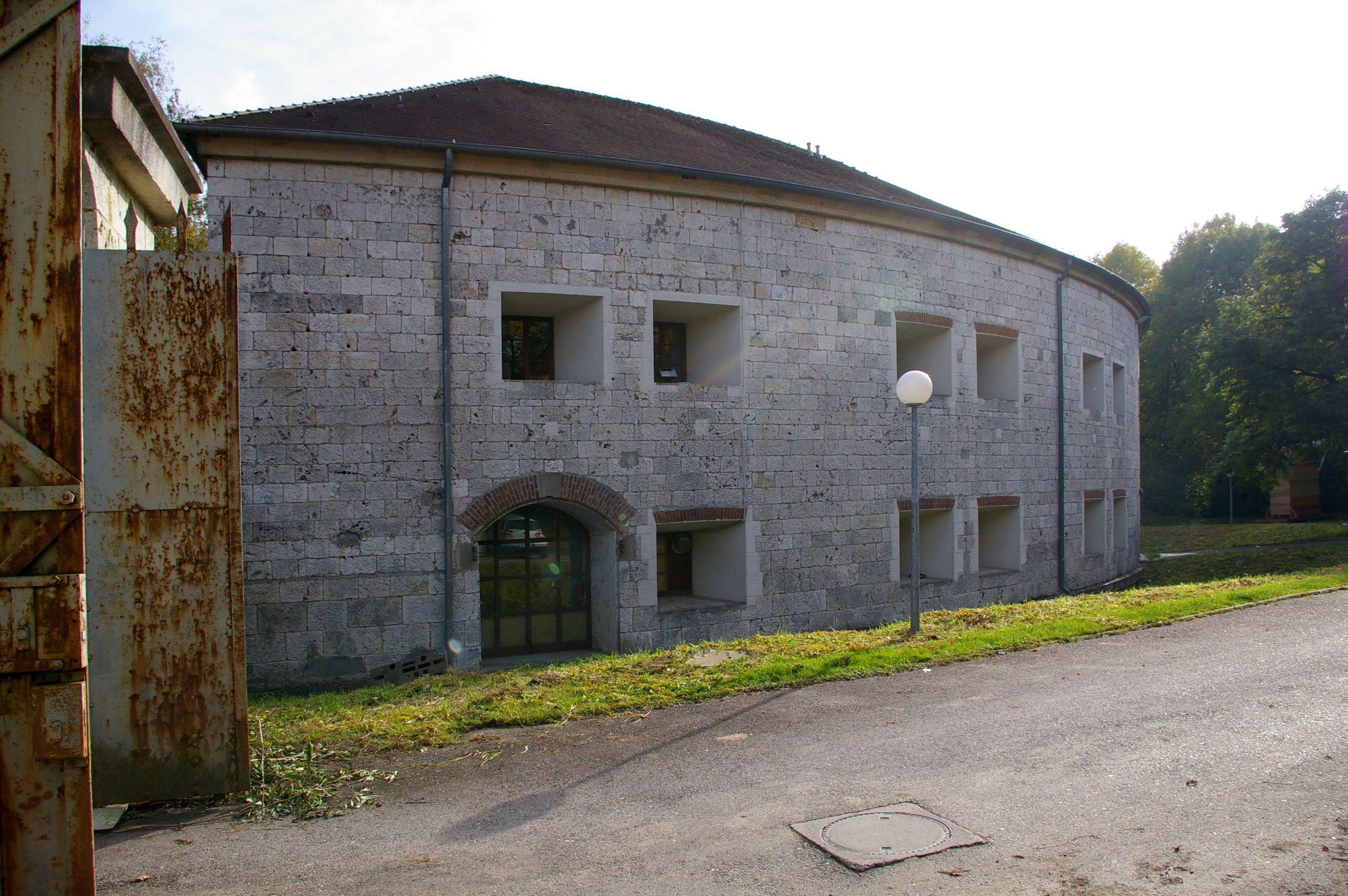 Reduit des Forts Unterer Eselsberg